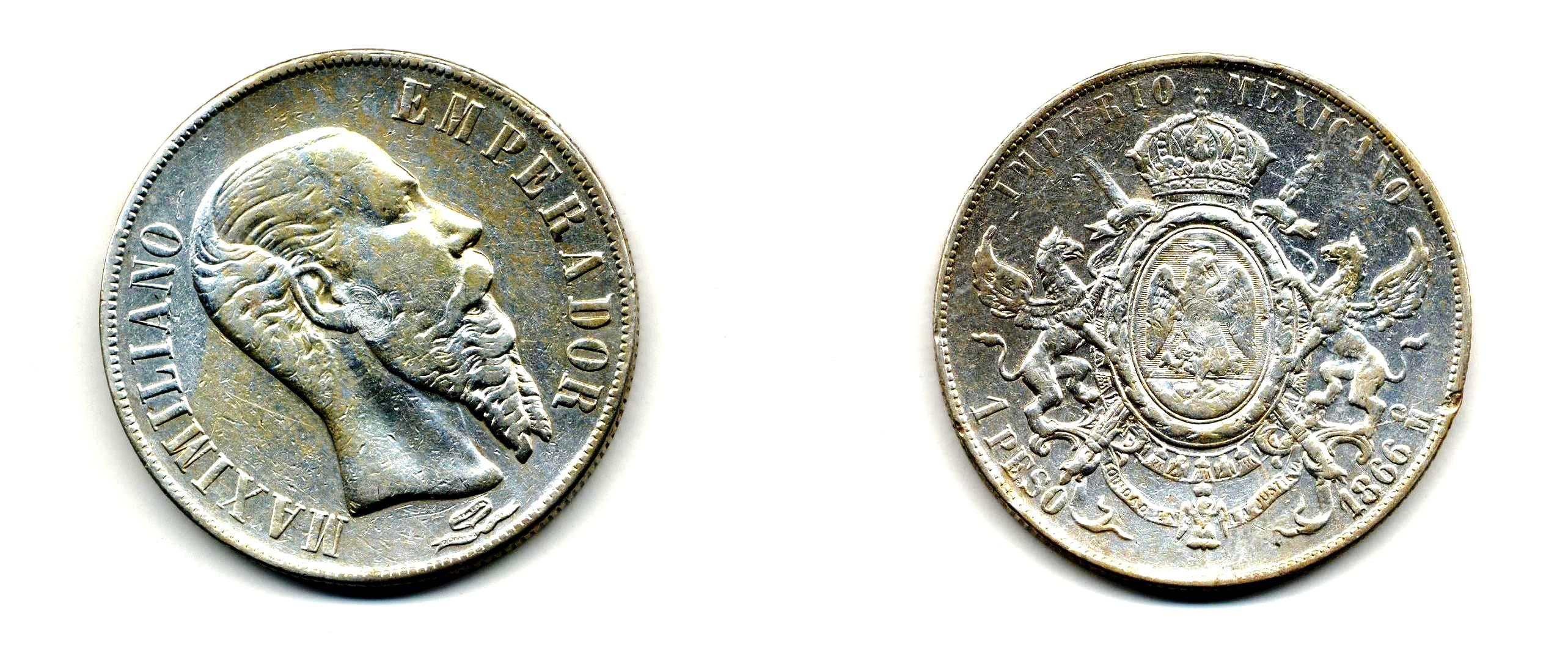 Moneda de 1 peso acuñada en la ceca de México en 1866.